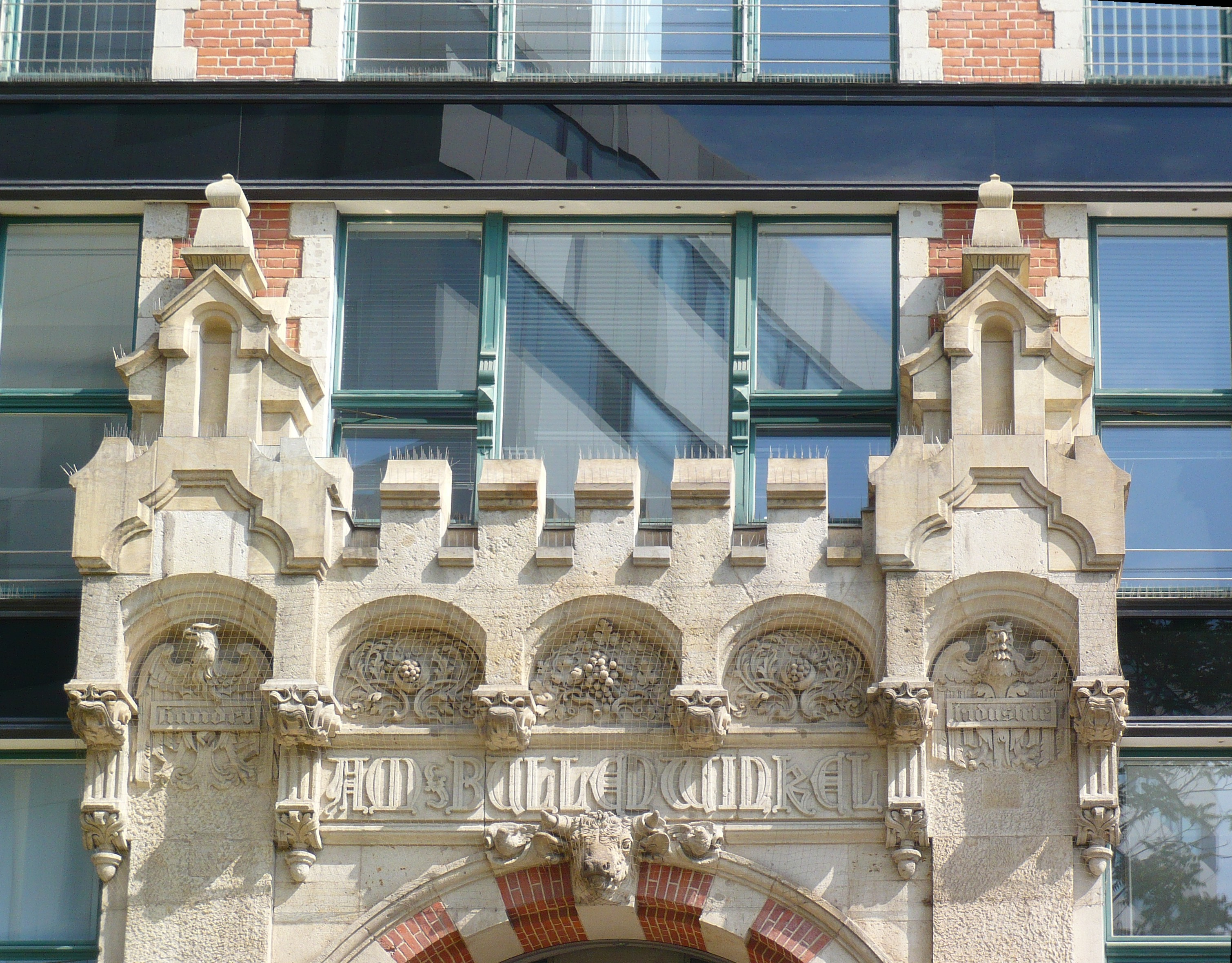 Mitte, Taubenstr., Fassadenschmuck